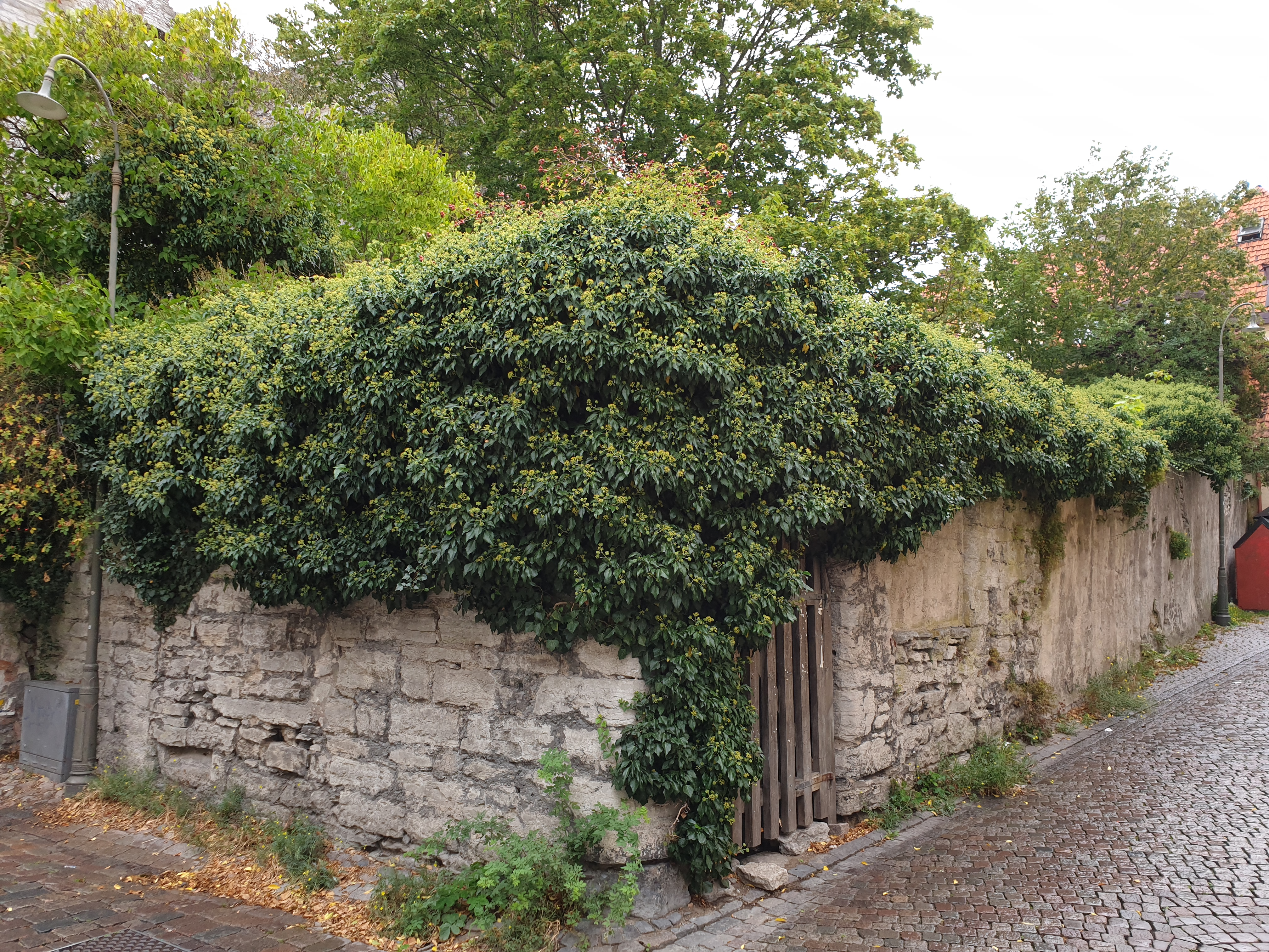 ruin i Visby